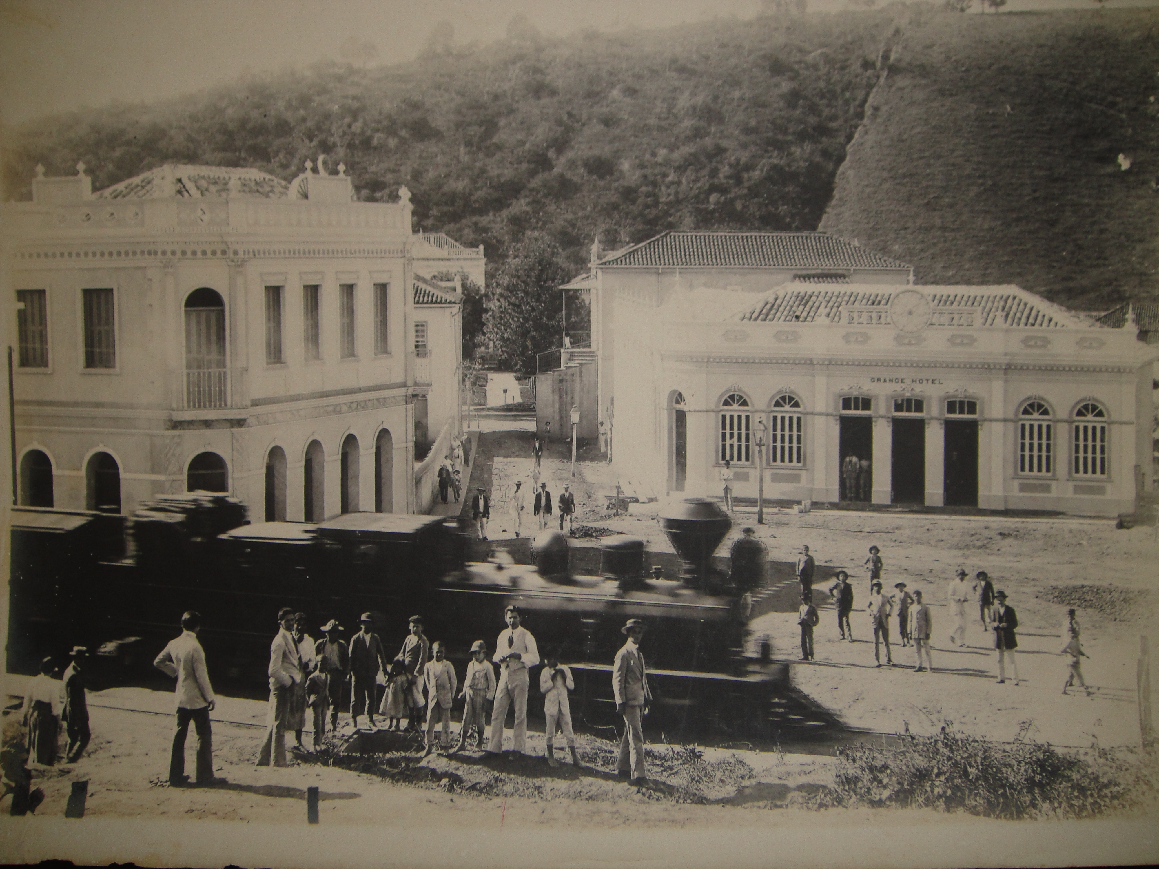 Rubim, e do lado esquerdo a antiga sede do banco do estado